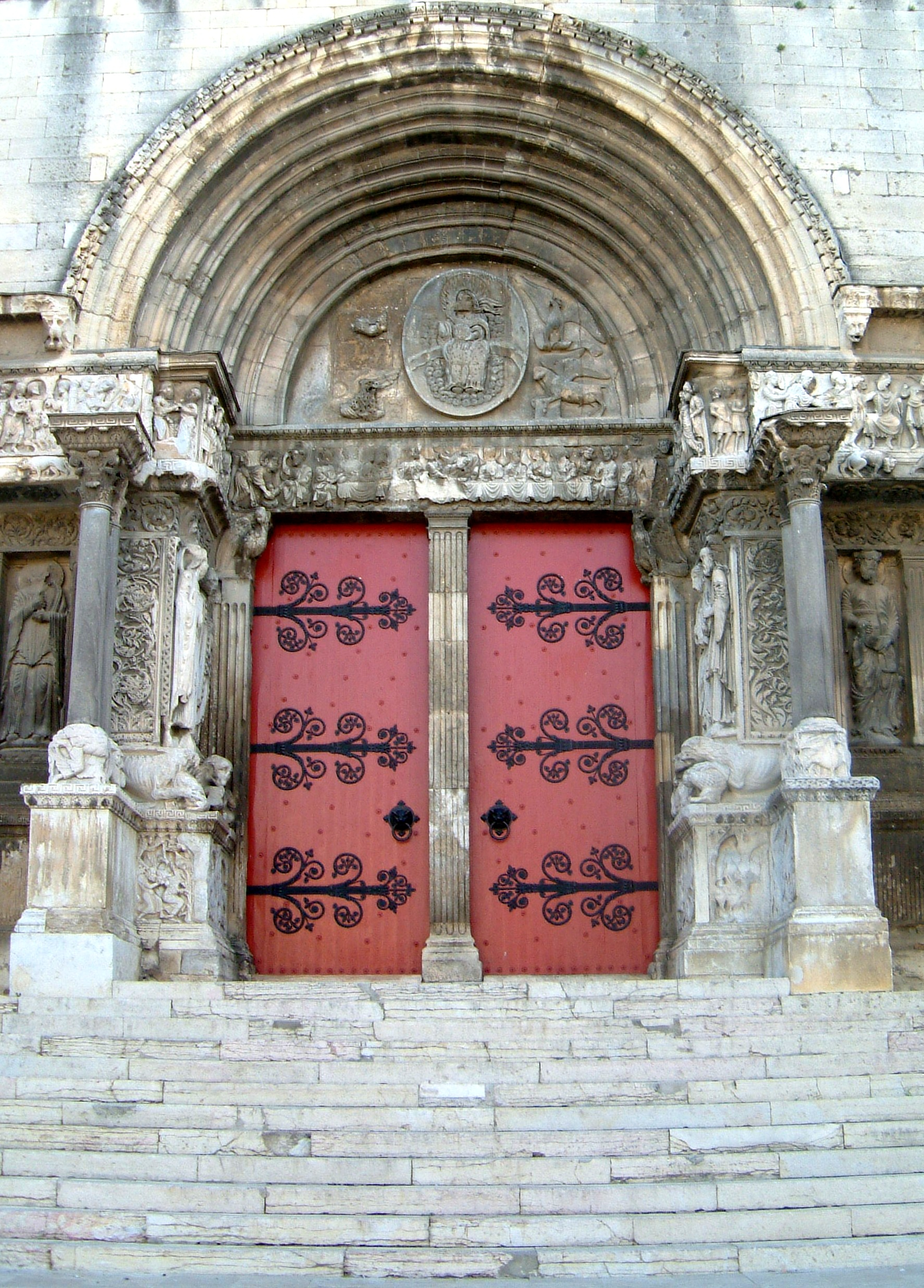 Portal der Kathedrale von Saint-Gilles (Camargue, Südfrankreich)